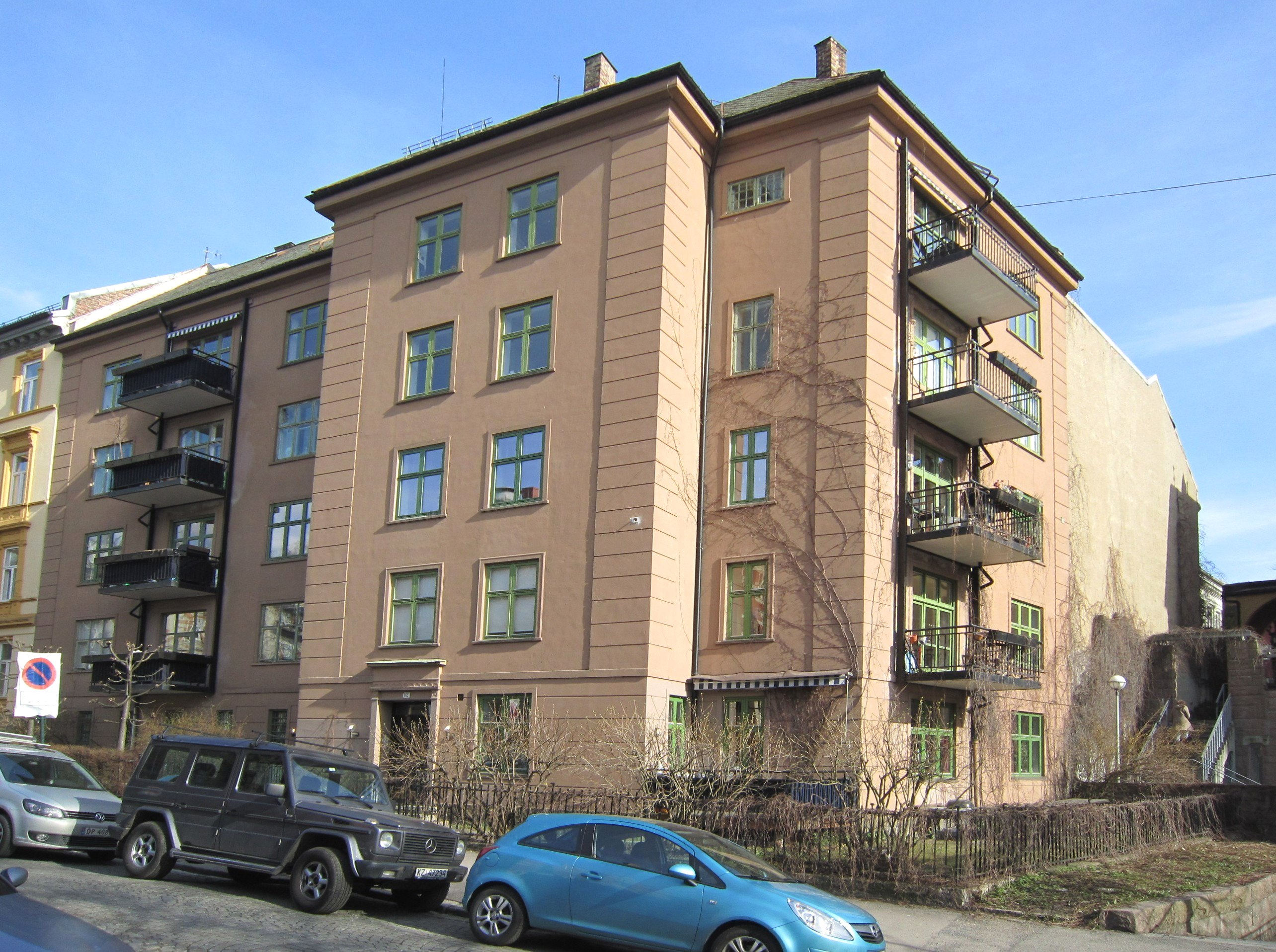 Oscars gate 82 (ark. Bjarne Hvoslef)